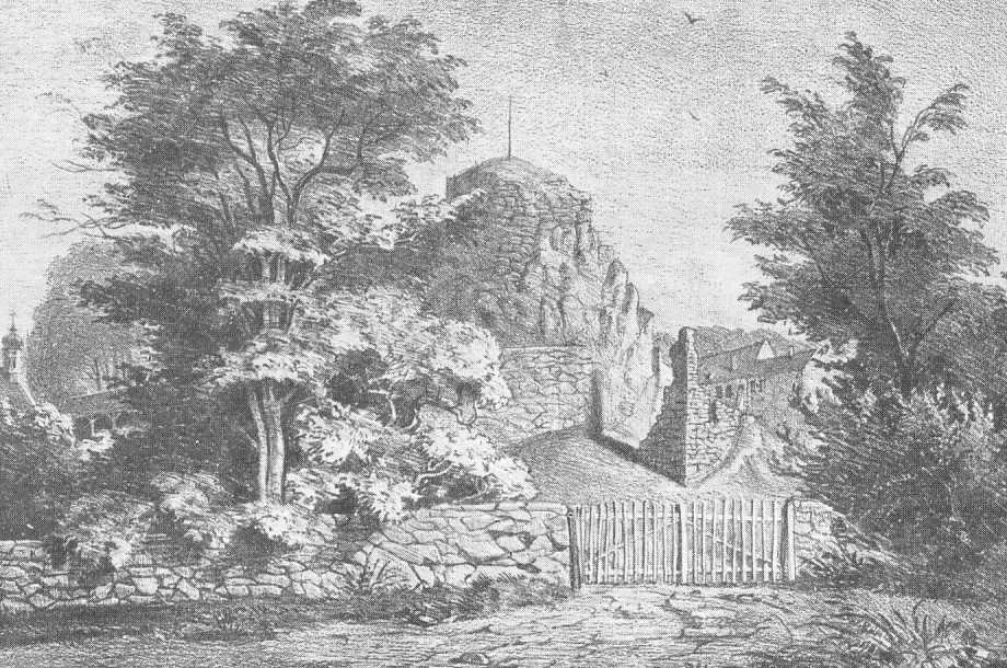 Burgruine Konstein bei Wellheim, Litograhie von 1835